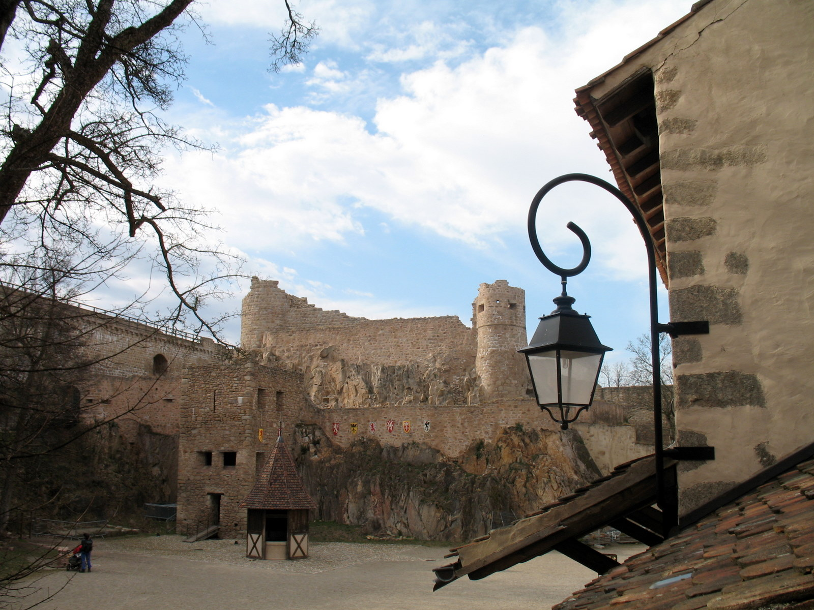 Château de Haut-Landsbourg